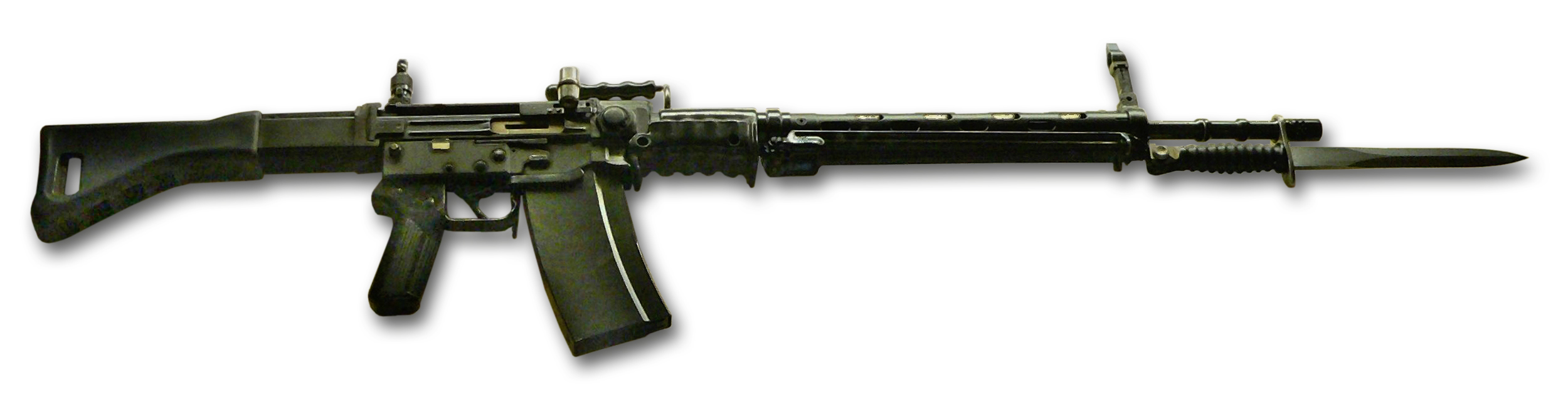 Sturmgewehr G2